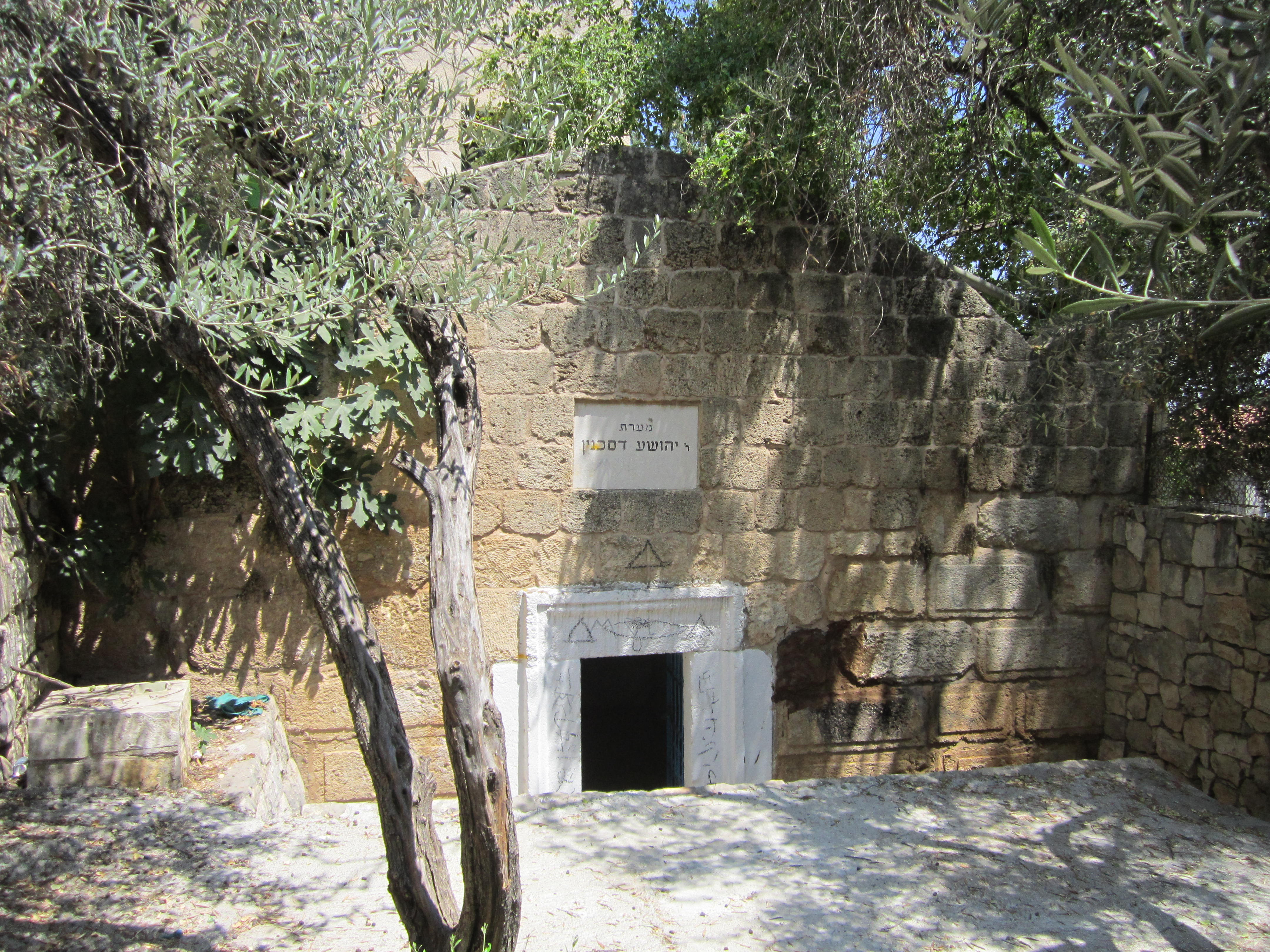 רבי יהושע דסכנין היה אמורא בן הדור הרביעי לאמוראי ארץ ישראל. חי ופעל במאה הרביעית. מקום מגוריו היה בכפר סכנין בגליל התחתון, שם גם מזוהה מקום קברו וקבר אשתו בסמוך לקברו של רבי שמעון דסכנין. במשך הדורות שימש הקבר מקום עלייה לרגל. עולה רגל אלמוני תיאר קבר זה במאה ה- 14: "ומשם הלכנו לכפר סכנין, שם רב יהושע דכפר סכנין, בארון של אבן וכיסוי של אבן נאה עליו, כלי נאה מאד, ושני צדיקים אצלו בארונות... והם בתוך בית אחד". בפי הערבים הוא כונה "נבי א-סאדיק" ונראה שקברו היה מקודש גם להם. [ויקיפדיה]